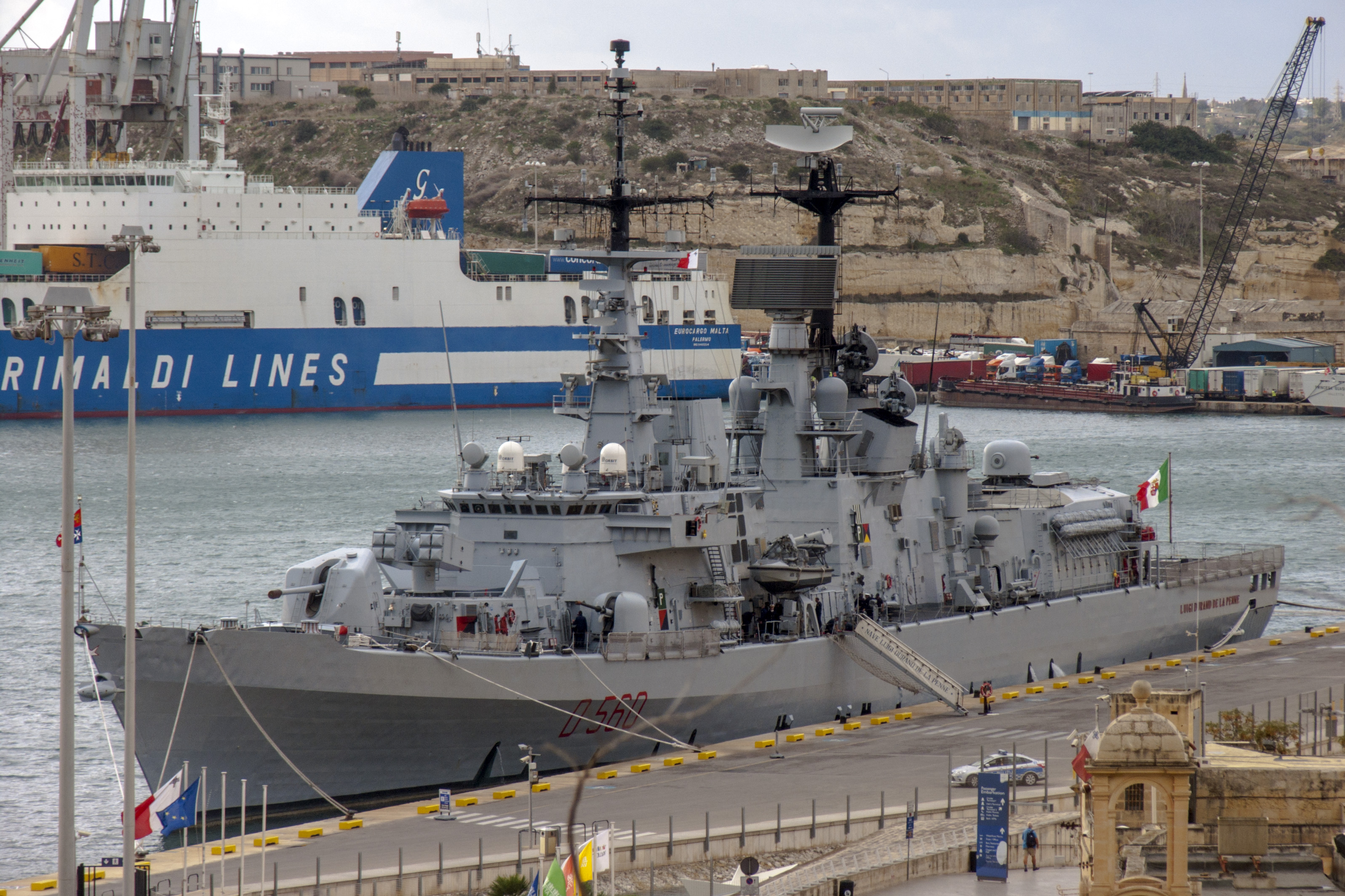 Эсминец «Луиджи Дуранд де ла Пенне» в Валлетте.